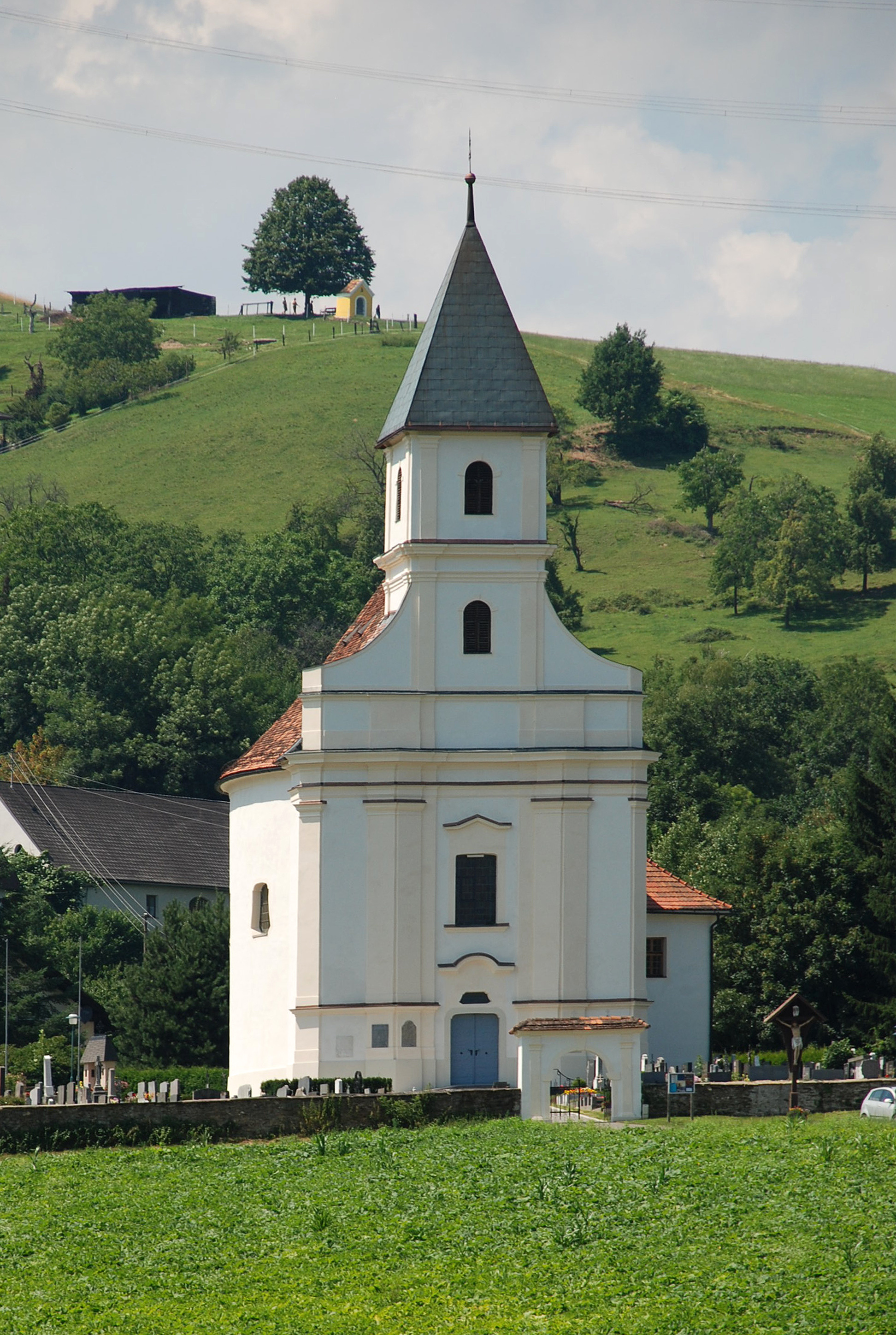 Hollenegg, Steiermark, Österreich: Patrizikirche